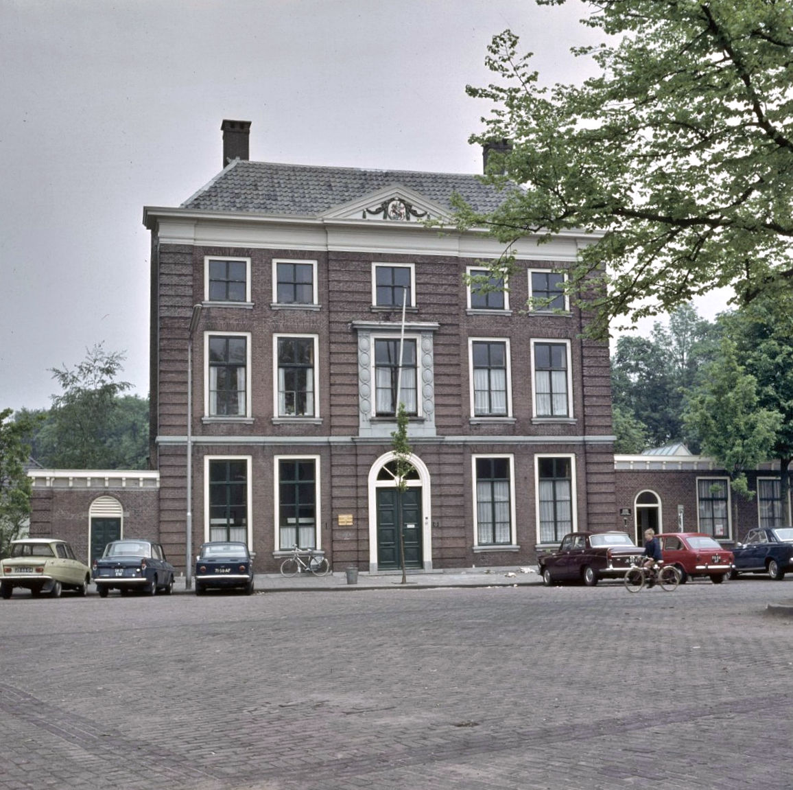 Voormalige Sint-Jorisdoelen: Overzicht van de voorgevel